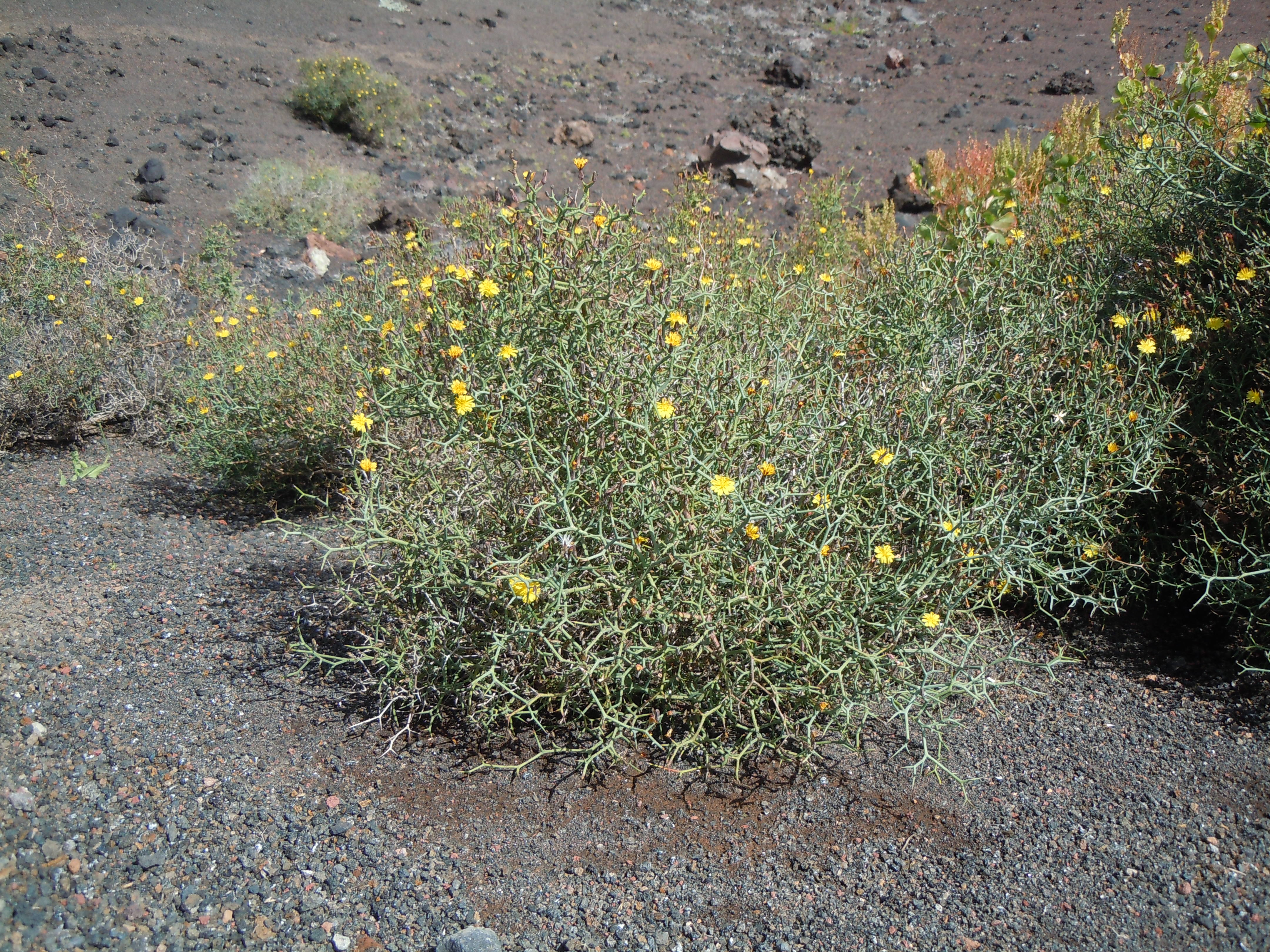 Launaea arborescens à Lanzarote, Playa Blanca